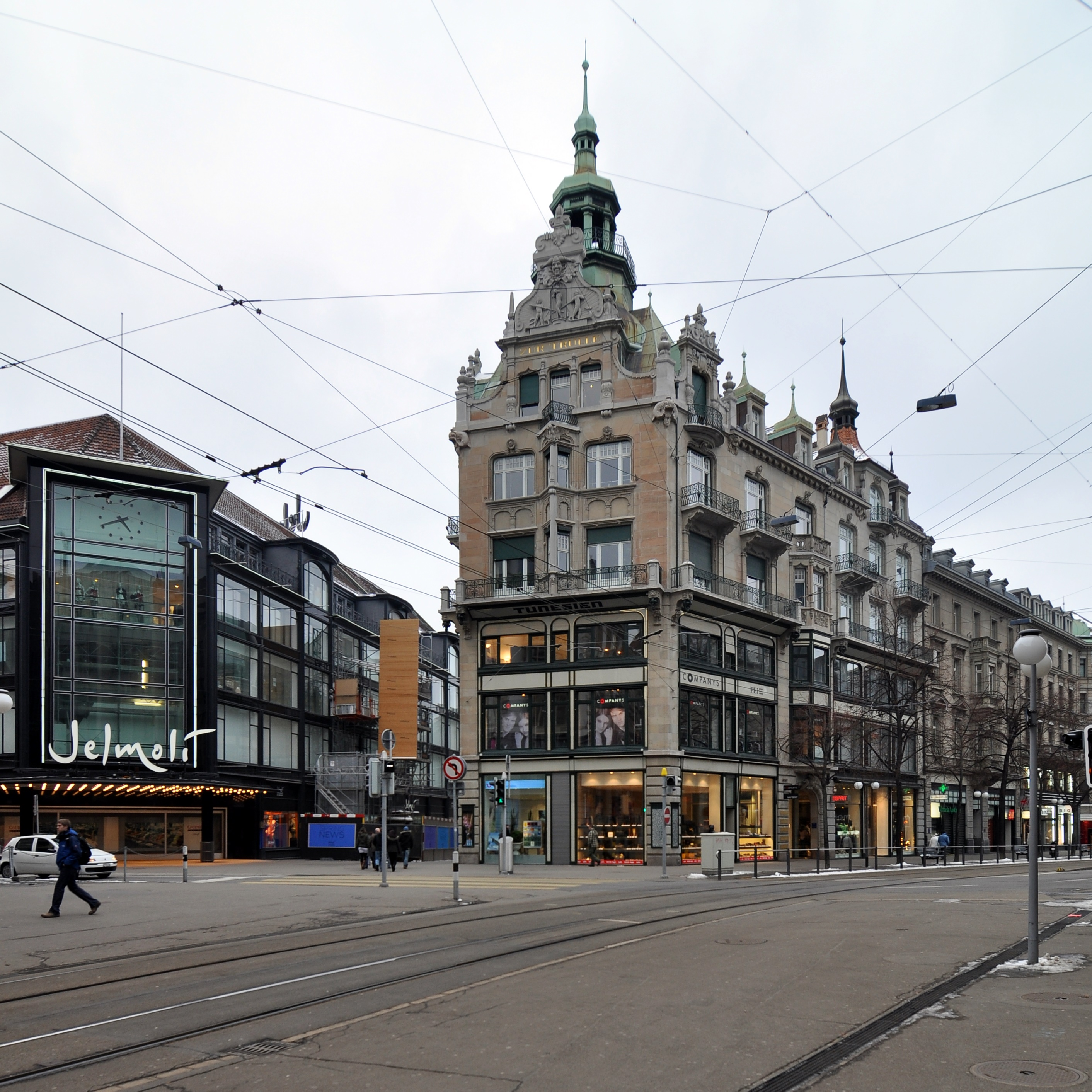 Geschäftshaus Zur Trülle, Bahnhofstrasse Zürich. Baubewilligung 1897 Architekten: Pfleghard und Haefeli